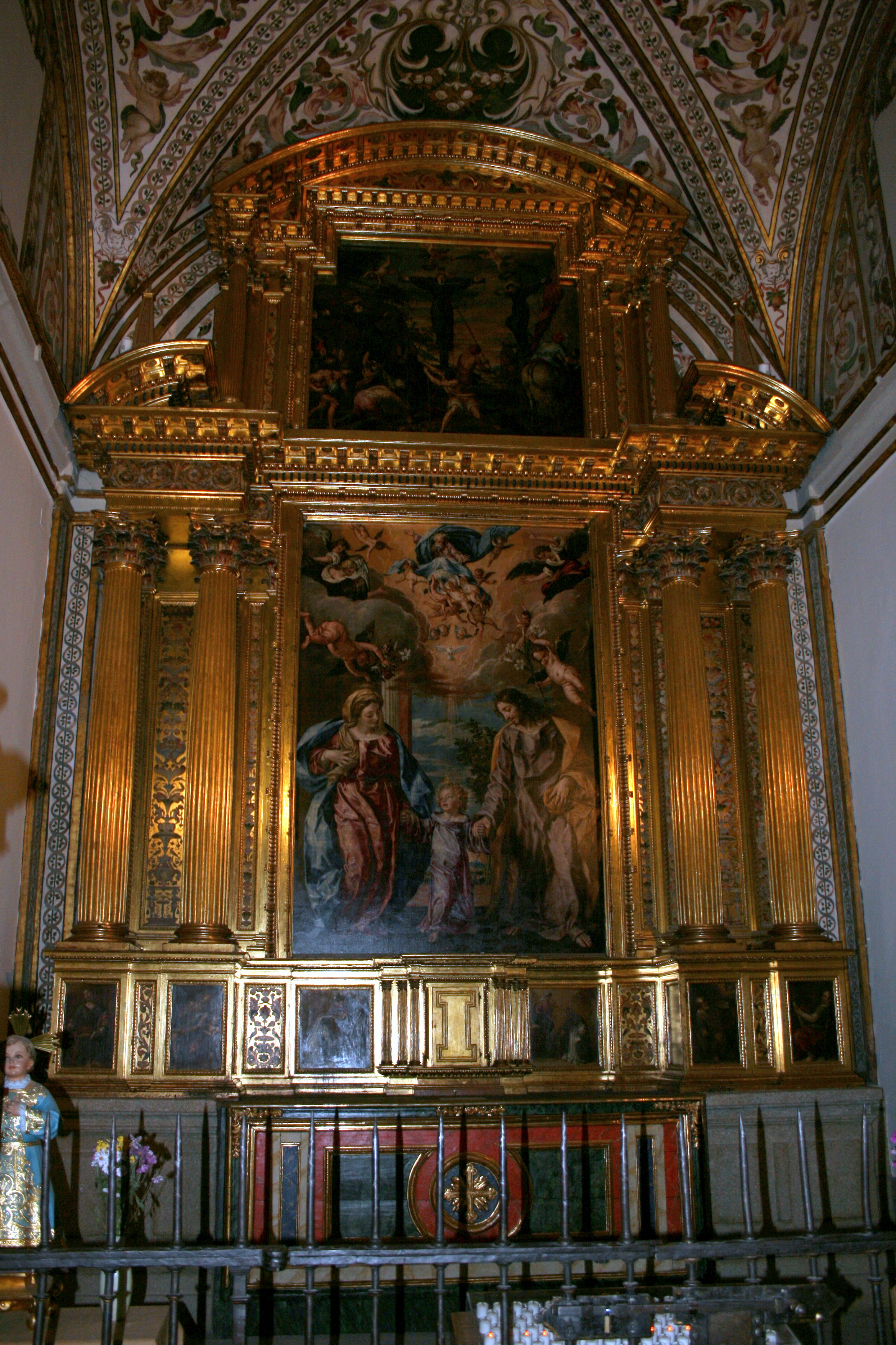 Retablo de la Sagrada Familia del pintor y arquitecto Sebastián Herrera Barnuevo conservado en la Real Colegiata de San Isidro de Madrid.